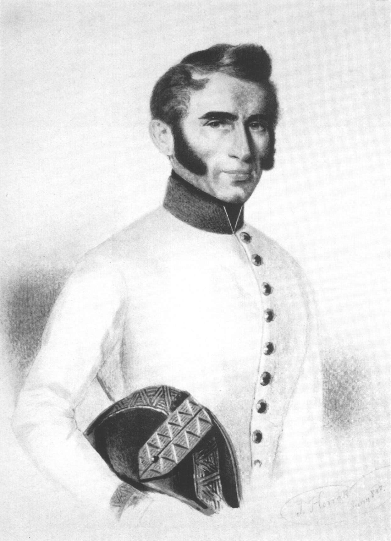 Johann [Nepomuk Franz de Paula Joseph Borromäus Leopold] Freiherr von Stutterheim (30.10.1805-25.01.1870) k.u.k.Generalmajor